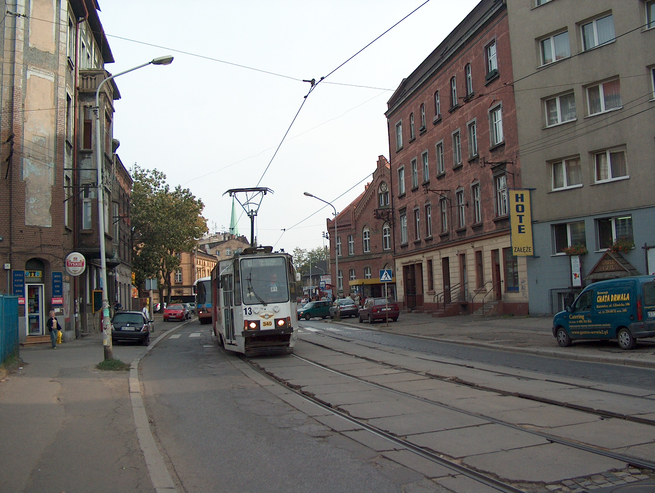 Ul. Gliwicka w Katowicach